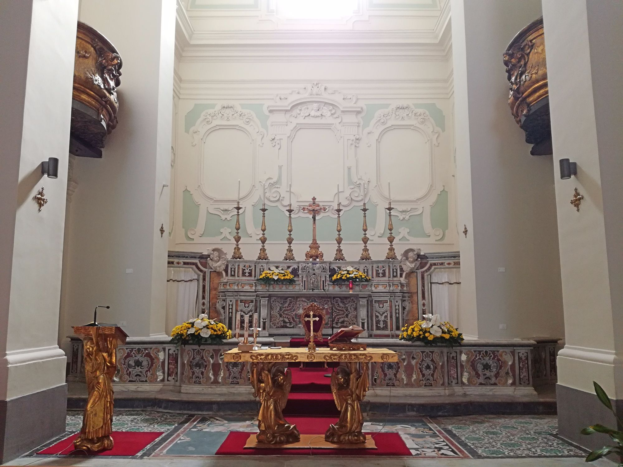 Interno Carlo alle Mortelle